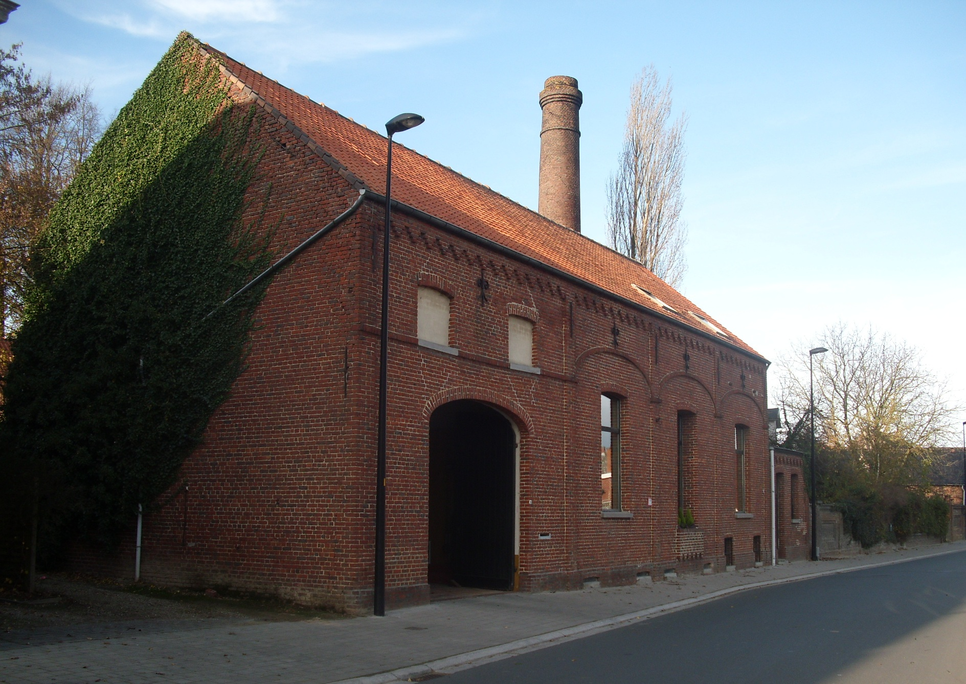 Brouwerij Merchie - Hofveldstraat - Schorisse - Maarkedal - Oost-Vlaanderen - België